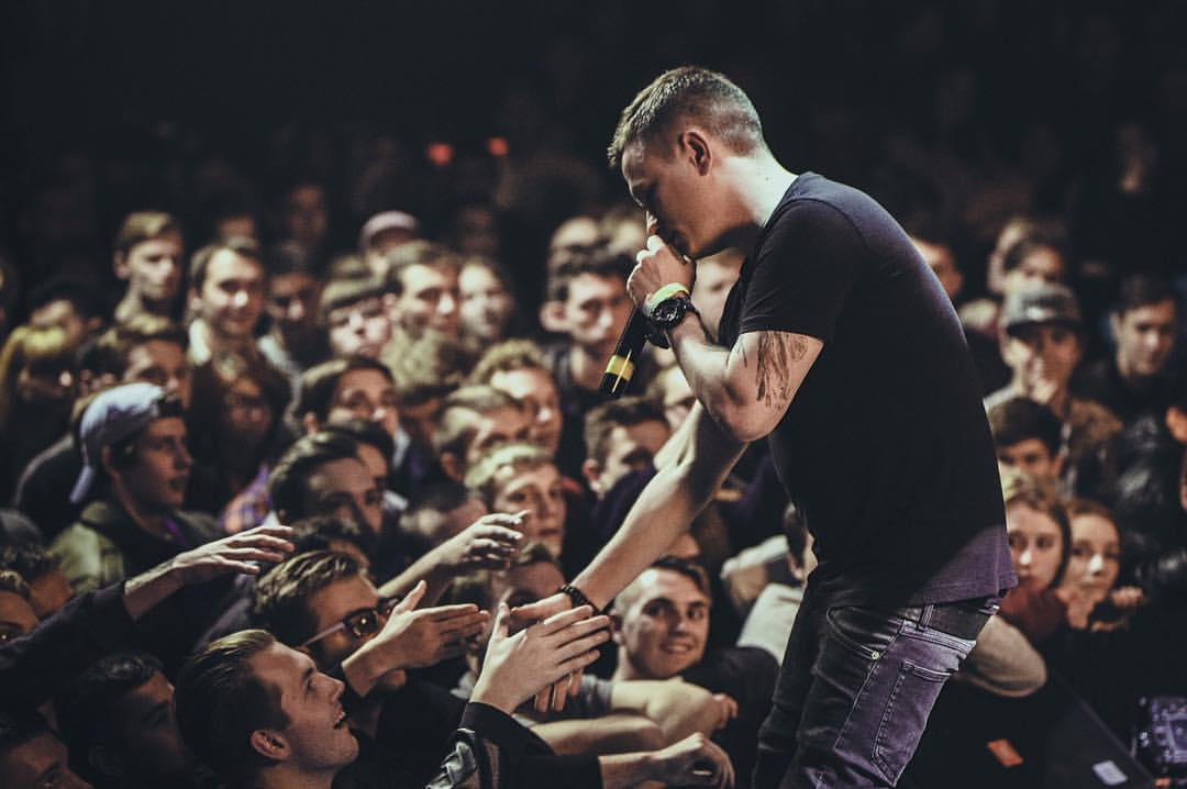 PLC. Москва. 2016